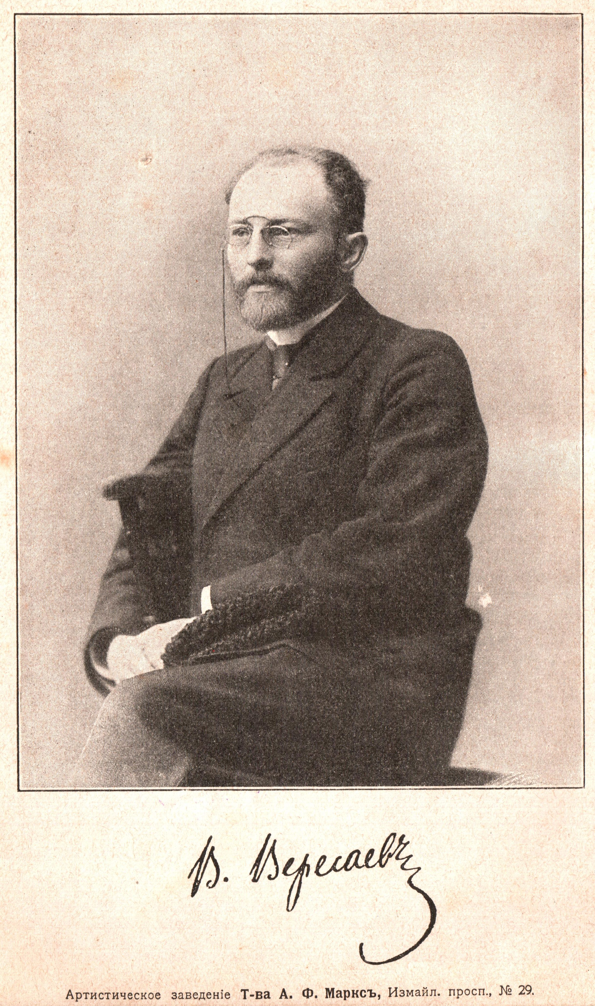 В.В. Вересаев. Фотографический портрет и автограф из первого тома Полного собрания сочинений, изд-во А.Ф. Маркс, СПб, 1913